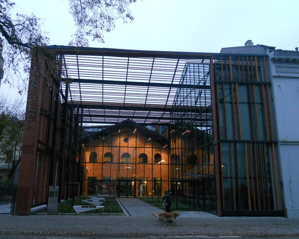 Małopolski Ogród Sztuki w Krakowie przy ul. Rajskiej.